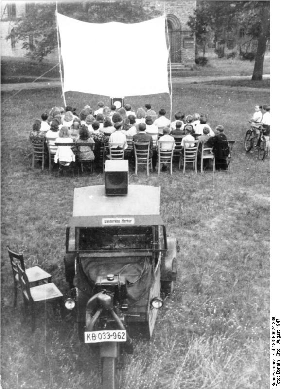 ADN-ZB/Donath Deutschland (sowjetische Besatzungszone) Prieros/Mark: Wanderkinos, die von Ohrt zu Ort ziehen, sorgen mit für die kulturelle Betreuung der Bevölkerung auf dem Lande. Aufn. Aug. 1947